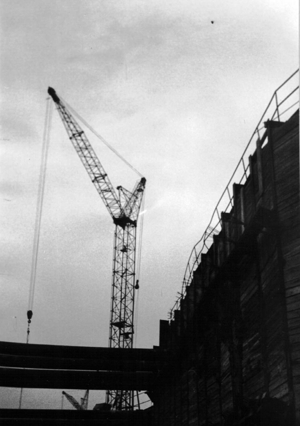 Budowa tunelu szlakowego metra B5 Stokłosy-Ursynów, listopad 1986.